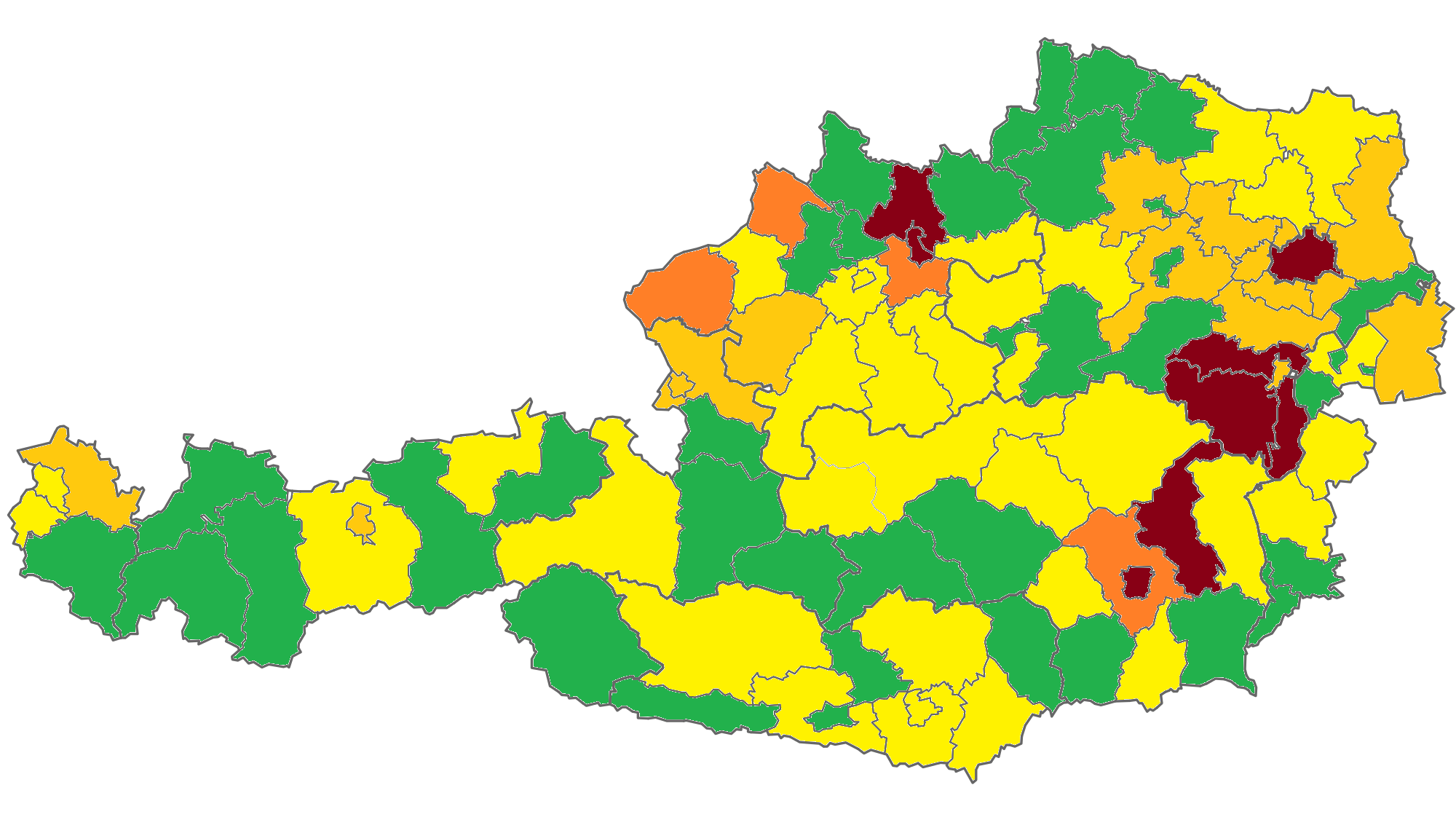 Verteilung des Namens Schwarz in Österreich.